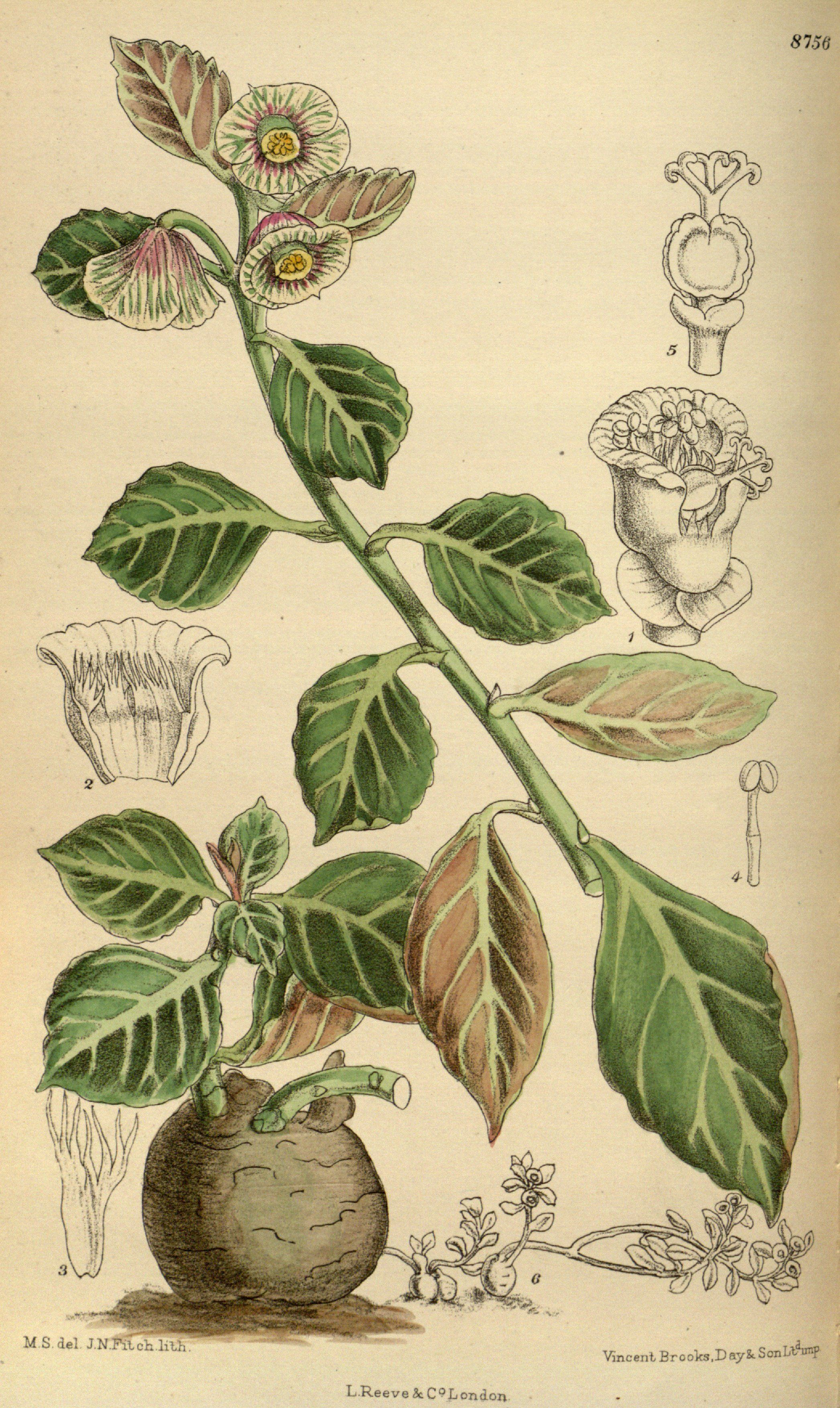 Monadenium erubescens (= Euphorbia major), Euphorbiaceae